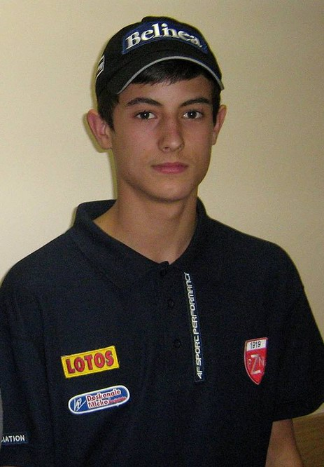 Maciej Kot - polski skoczek narciarski